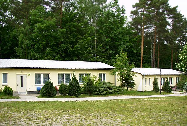 Bungalow 6 und 7 in Prebelow, erbaut in den 80er Jahren in der DDR